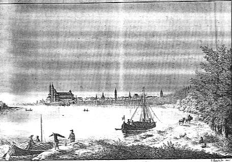 Speyer vom Rhein aus, Lithografie von Johann Gerhard Ruland (1785-1854)